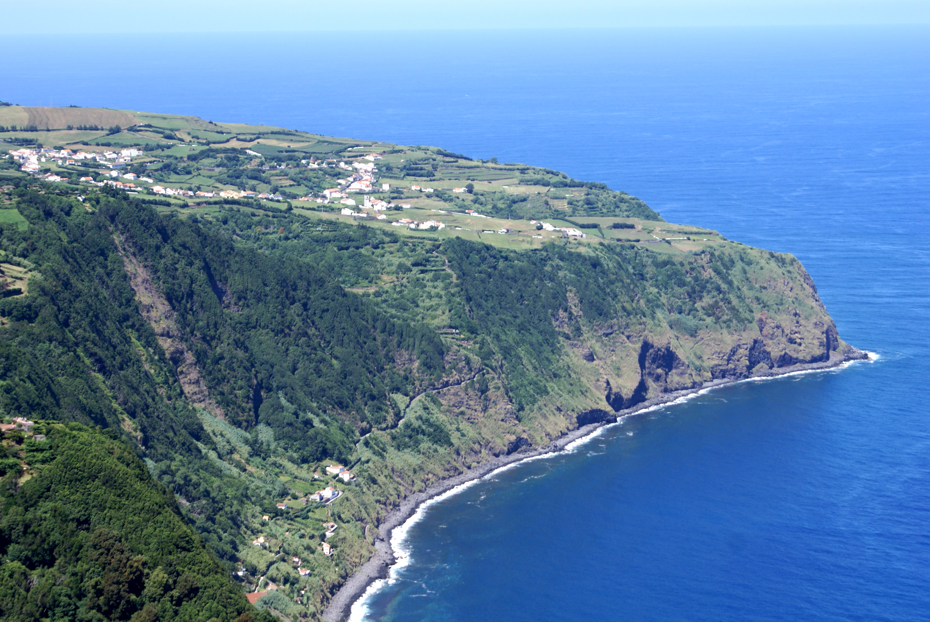 Miradouro da Ponta da Madrugada, falésias, Nordeste, ilha de São Miguel, Açores